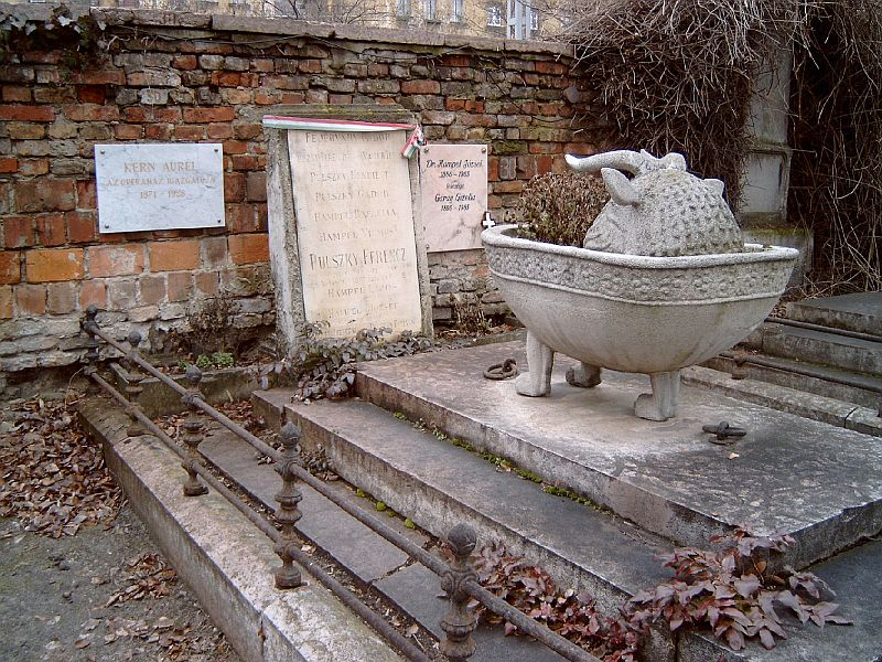 Pulszky Ferenc sírja Budapesten. Kerepesi temető: J. 30. (Szobrász: Donáth Gyula.) Vele együtt: Pulszky Ferencné, Walter Teréz (Bécs, 1819. jan. 7. – Buda, 1866. szept. 6.) írónő; Hampel József (Pest, 1849. nov. 10. – Bp., 1913. márc. 25.) régész, egyetemi tanár; Kern Aurél (Bp. 1871. május 17. – Bp., 1928. január 20.) újságíró, kritikus, zeneszerző színházigazgató.